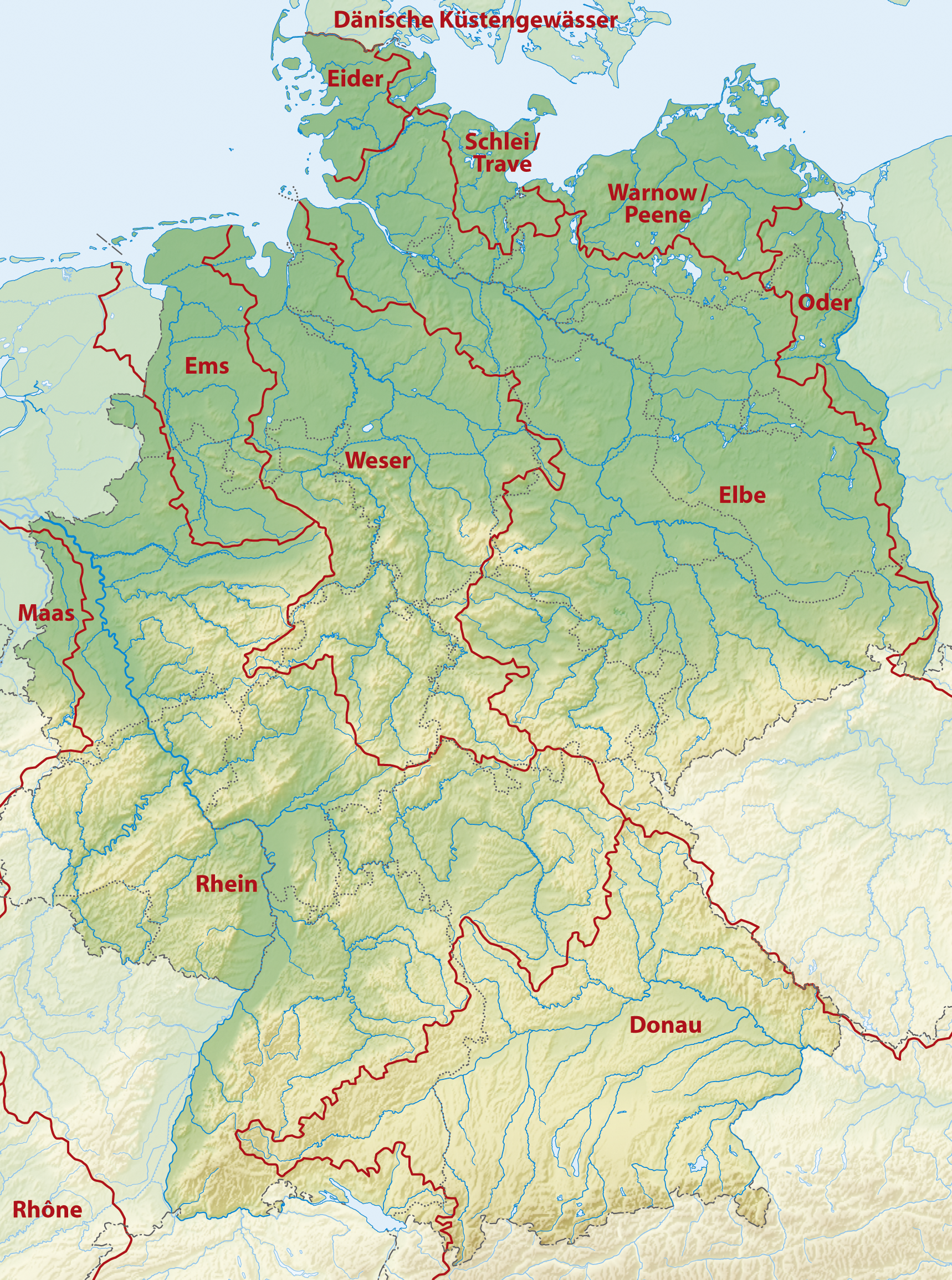 Karte der Flussgebietseinheiten in Deutschland (Richtlinie 2000/60/EG – Wasserrahmenrichtlinie)